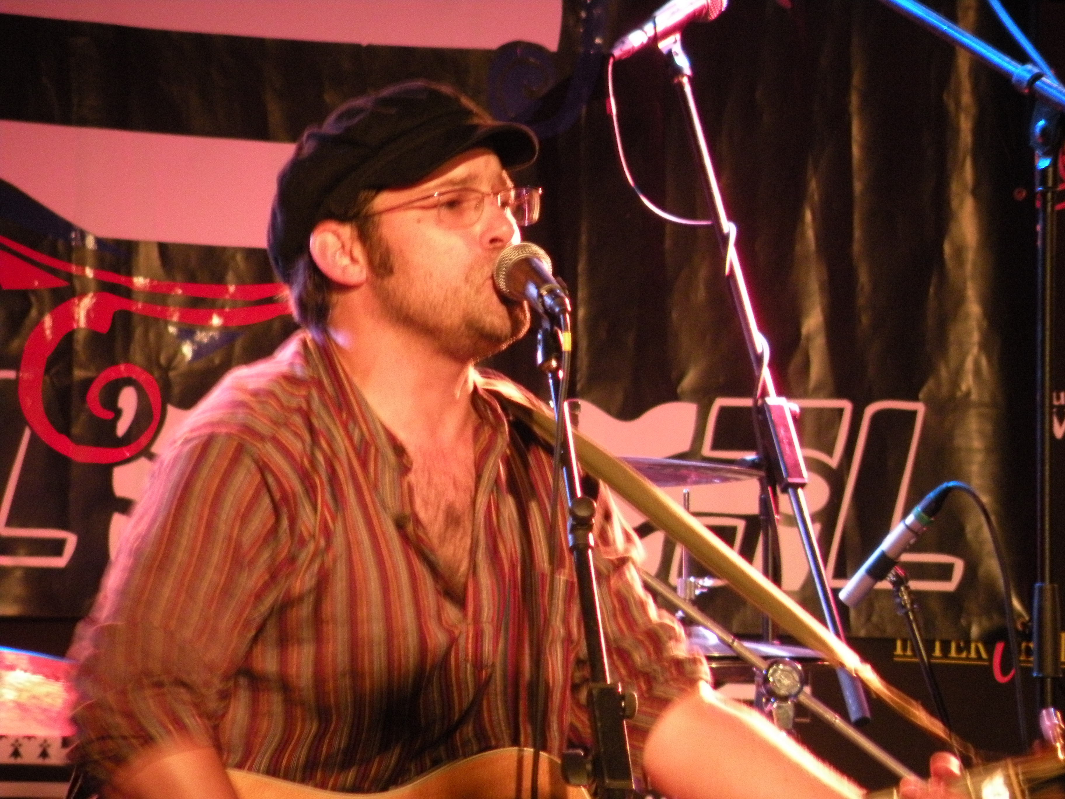 Le chanteur acadien Fayo en concert lors du Festival interceltique de Lorient 2010.